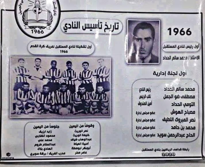 معلومات عن تأسيس نادي المستقبل بالجميل